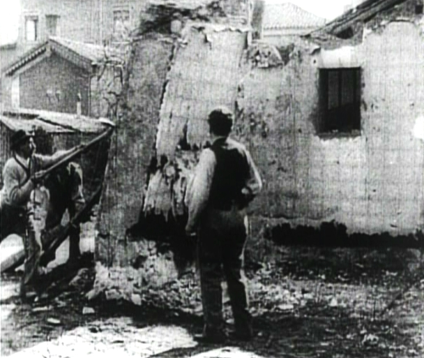 "La Démolition d'un mur", réalisé par Louis Lumière en 1895. De dos : Auguste Lumière. Film tourné pour activer la marche arrière (reconstruction miraculeuse !).